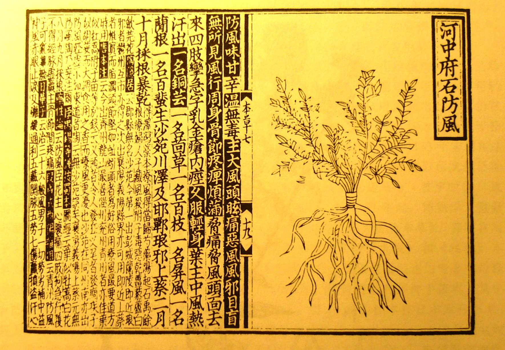 大观本草 石防风